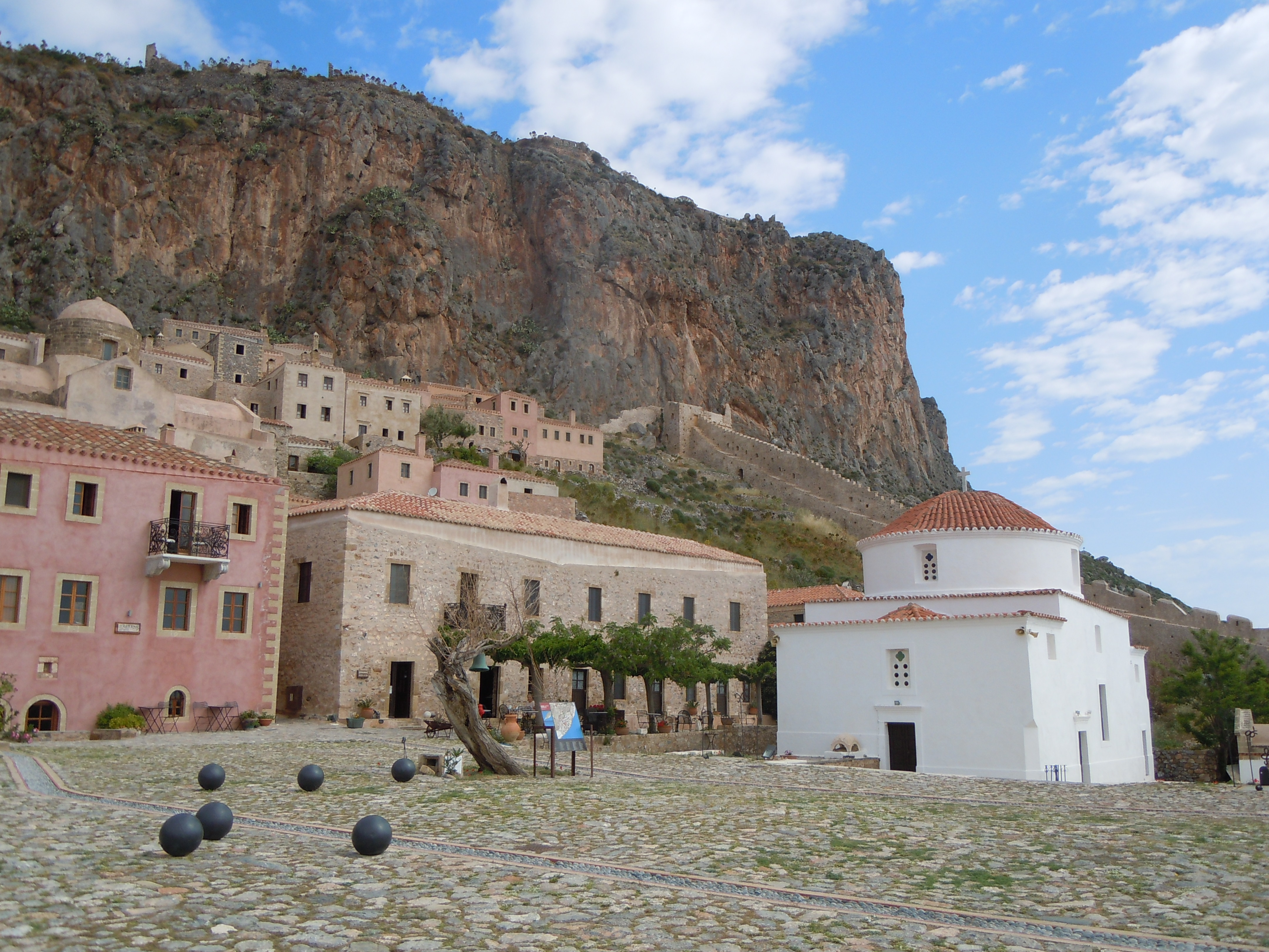 Place devant la Panaghia Chrisaffitisa (Monemvasia)